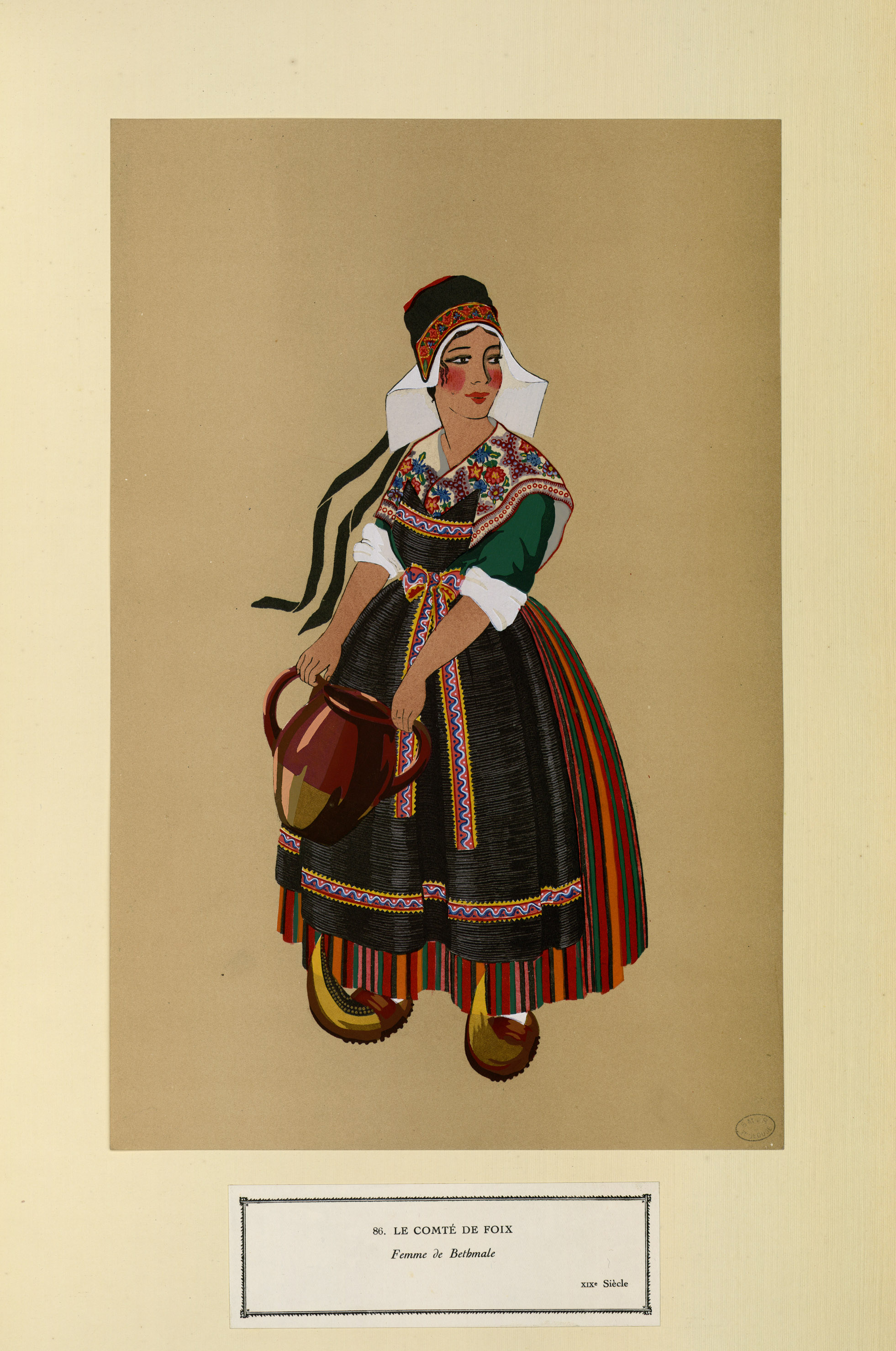 Femme de Bethmale - XIXe siècle